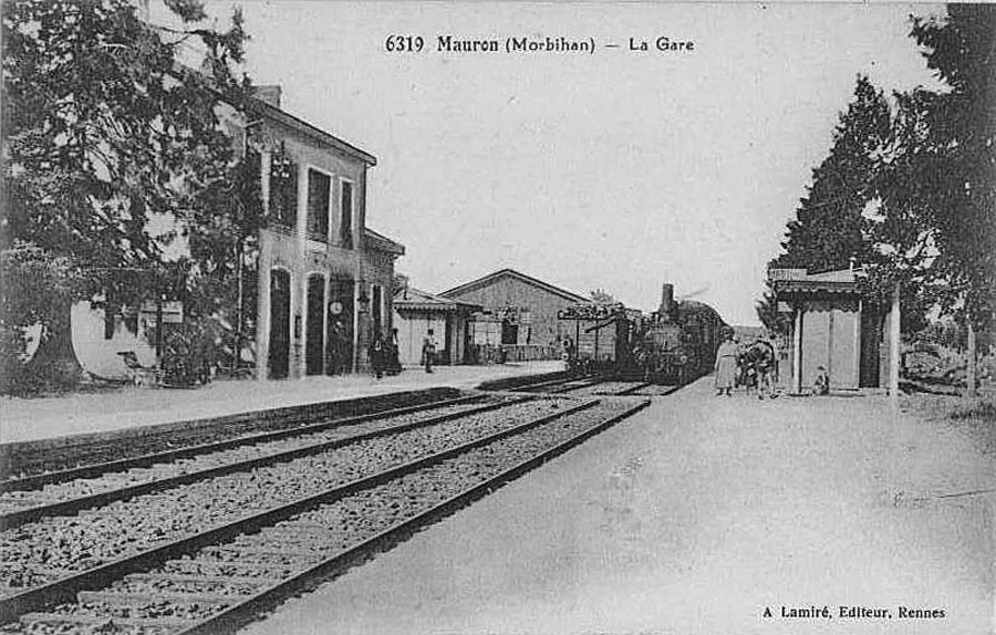 Gare de Mauron dans le Morbihan. Intérieur de la gare avec locomotive à vapeur.